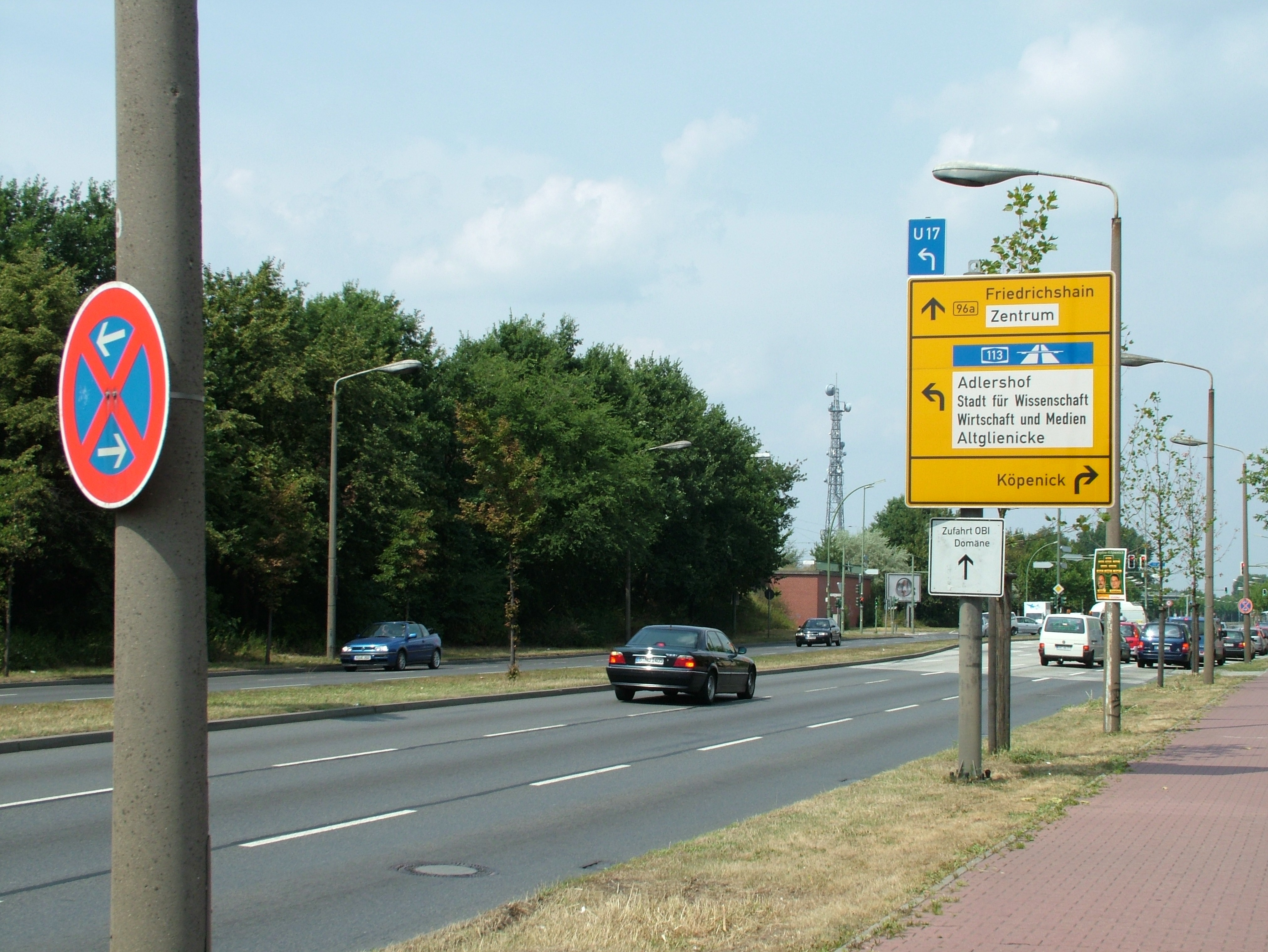 Bundesstraße 96a (Adlergestell) in Berlin-Adlershof in Richtung Berlin-Mitte